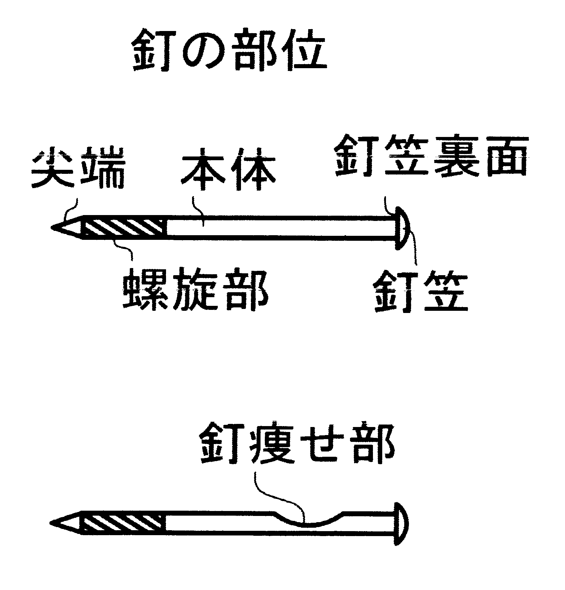 釘の部位と釘痩せ